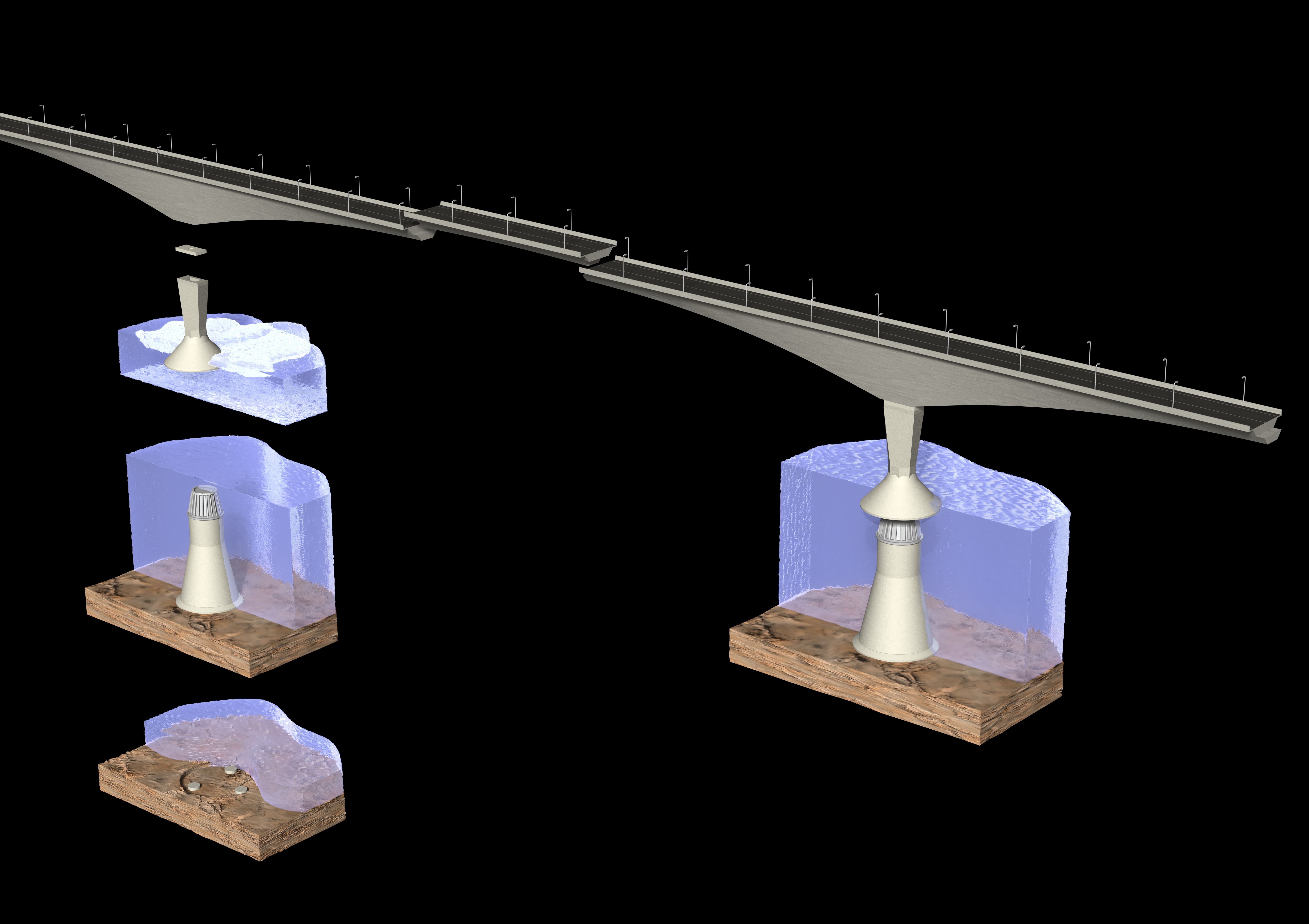 Modell eines Segments der Confederation Bridge.